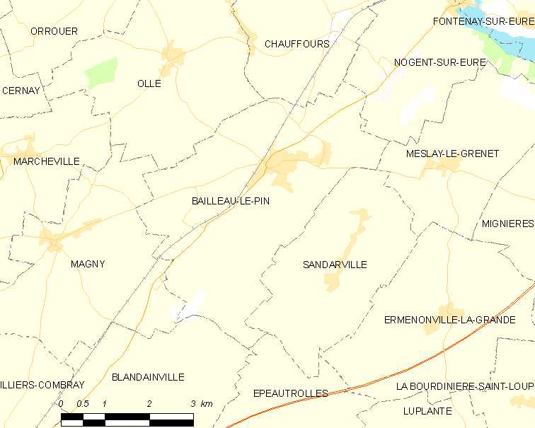 Carte de Bailleau-le-Pin et des communes limitrophes. Template:Map commune FR insee code 28021.png